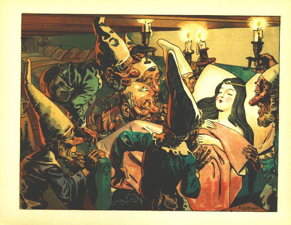 Franz Jüttner (1865–1925): Illustration from Sneewittchen, Scholz' Künstler-Bilderbücher, Mainz 1905